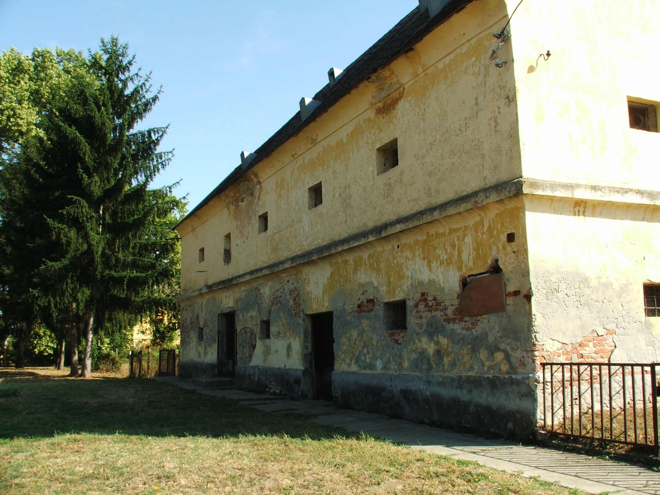 magtár, Istvándi This is a photo of a monument in Hungary. Identifier: 7901